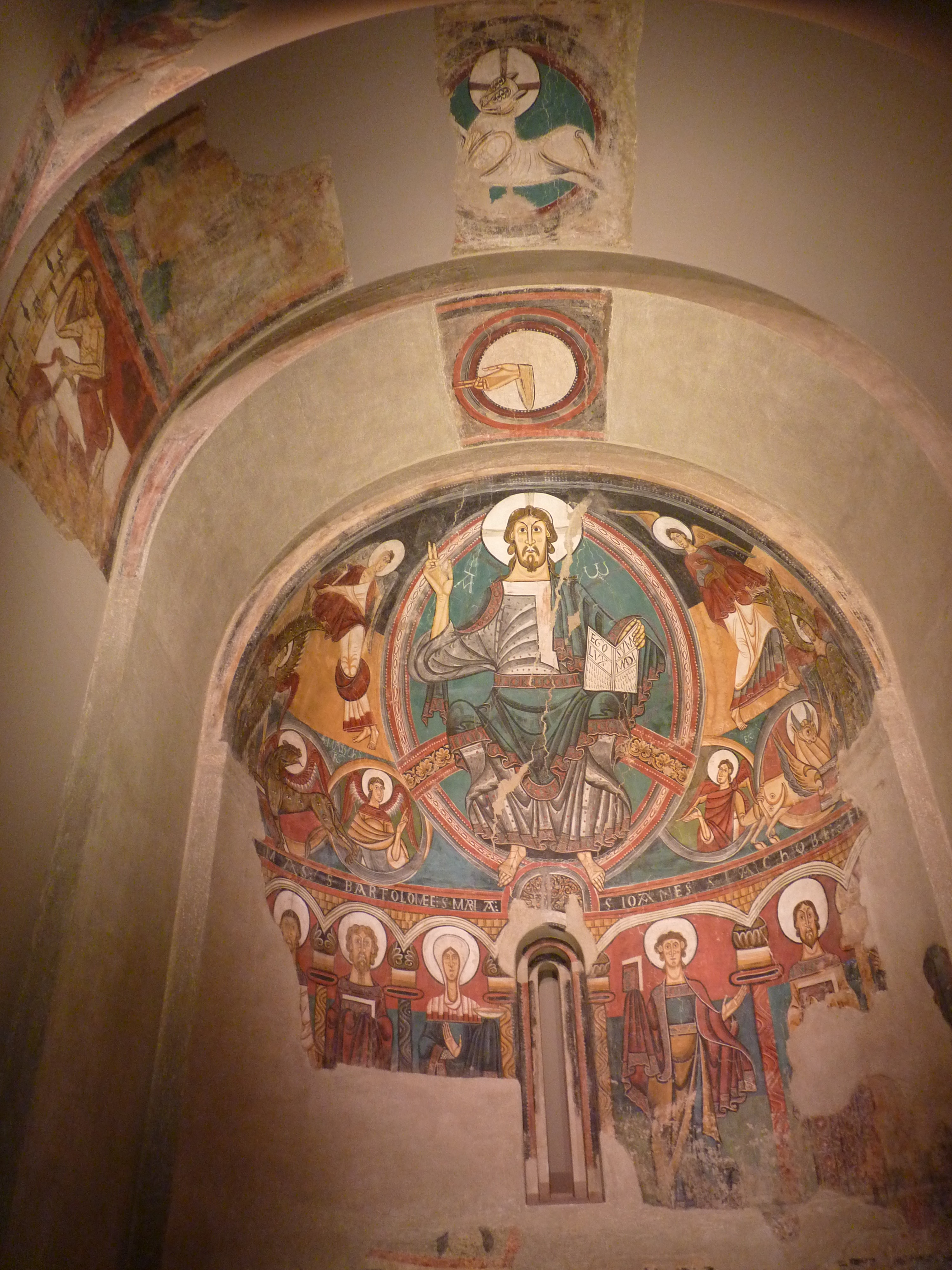 Banc presbiterial de Sant Climent de Taüll, segles XIII-XIV